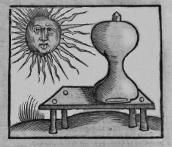 Distillation par le soleil. Liber de arte distillandi de compositis p. 60